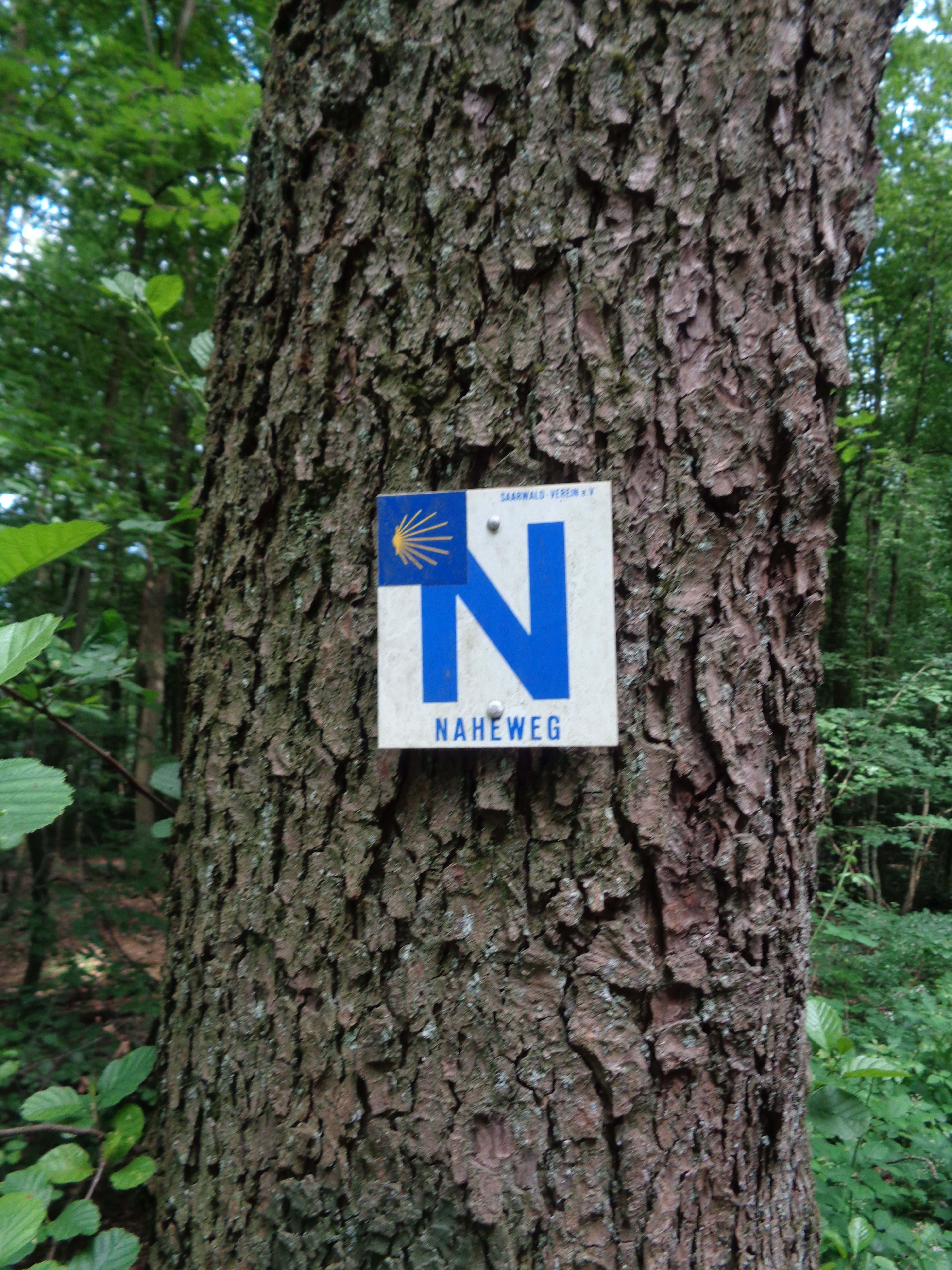 Wegmarkierung nahe Saarbrücken